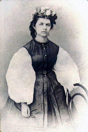 Драгоманова Ольга Петрівна (Олена Пчілка), Київ